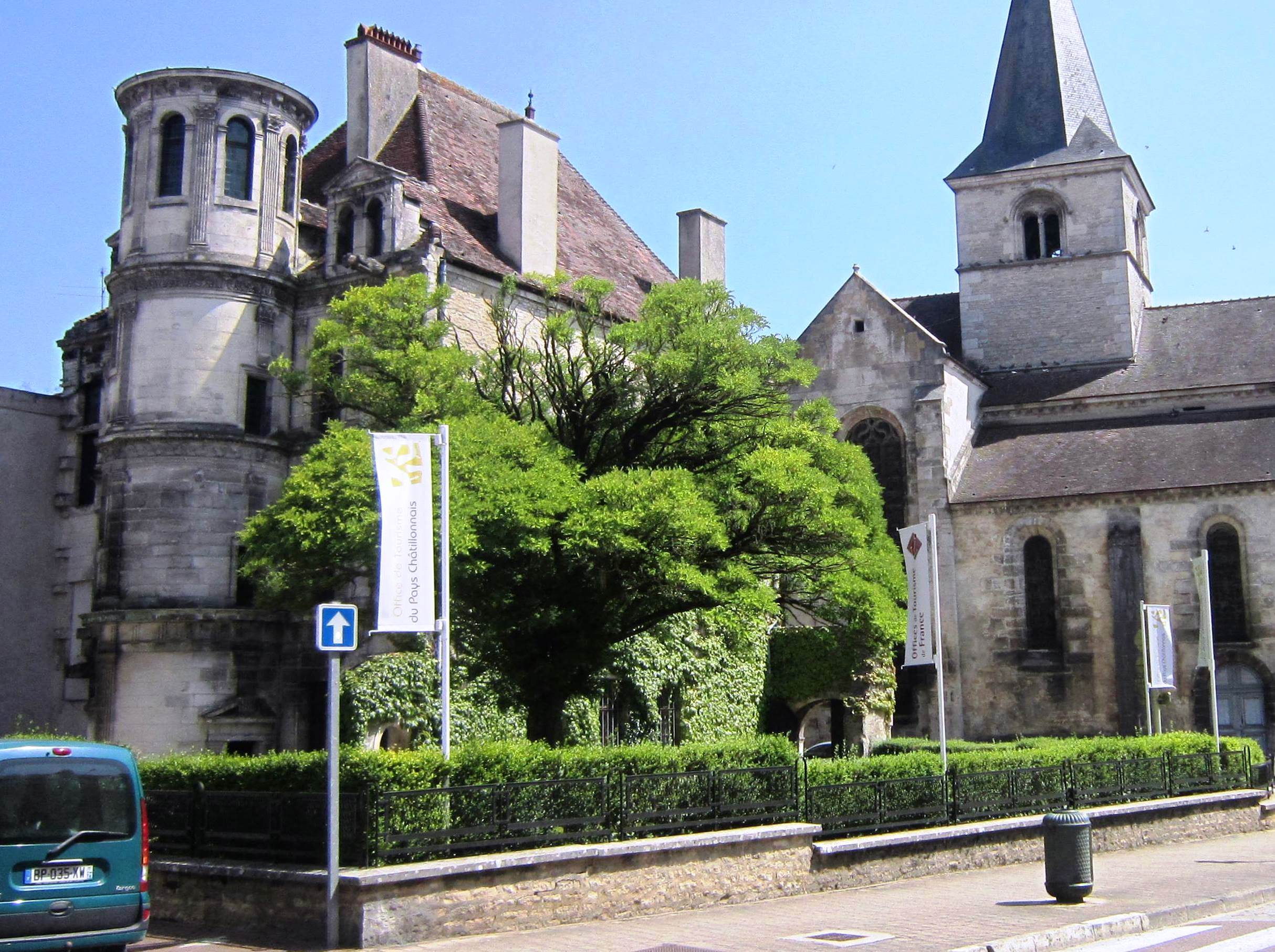 La maison Philandrier à Châtillon-sur-Seine